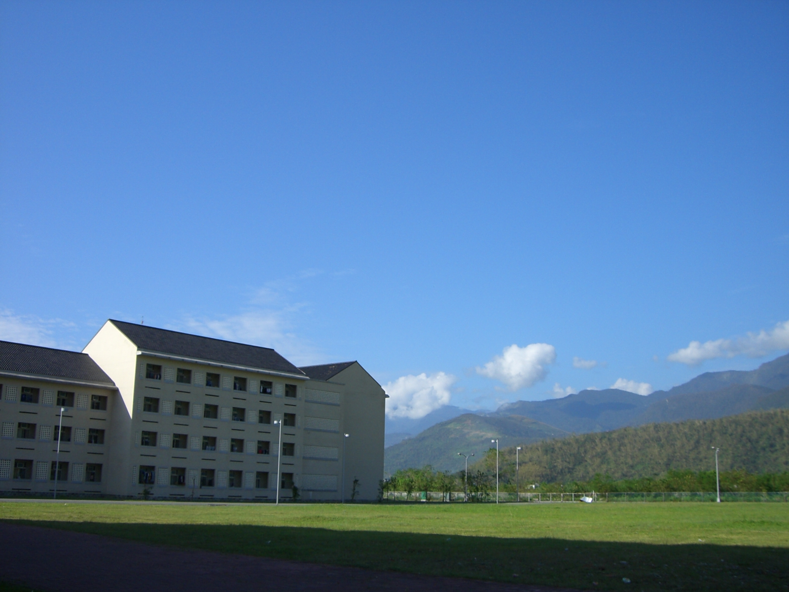 中華民國國立東華大學取景